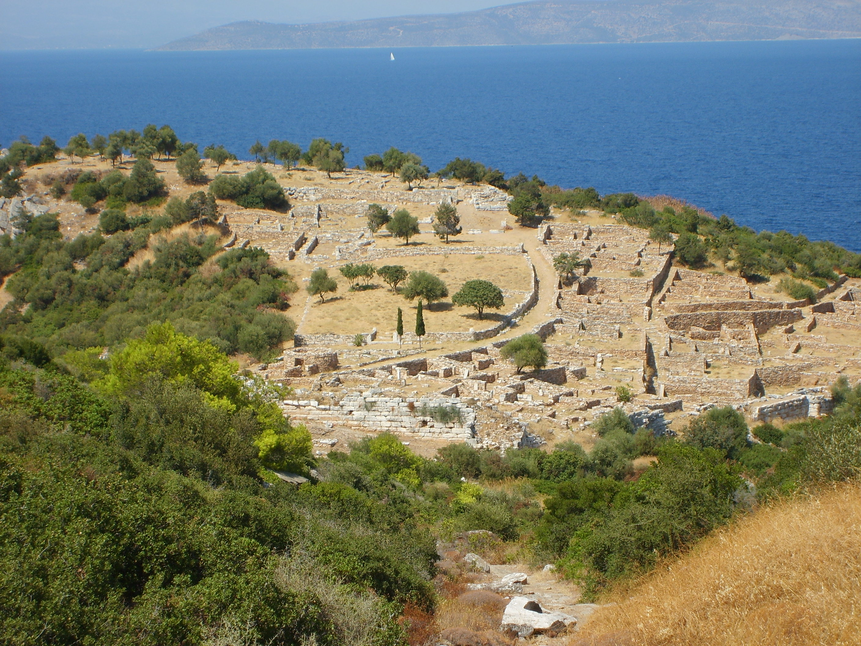 Ramnous (vue générale du site archéologique)